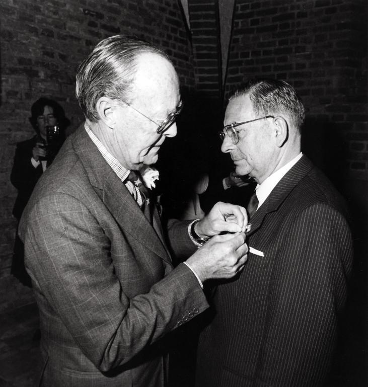 Prins Bernhard reikt aan drs. Peijnenburg, seceretaris-Generaal van Defensie, de Prins Mauritsmedaille uit. Nederland, Den Haag, 17 mei 1984.